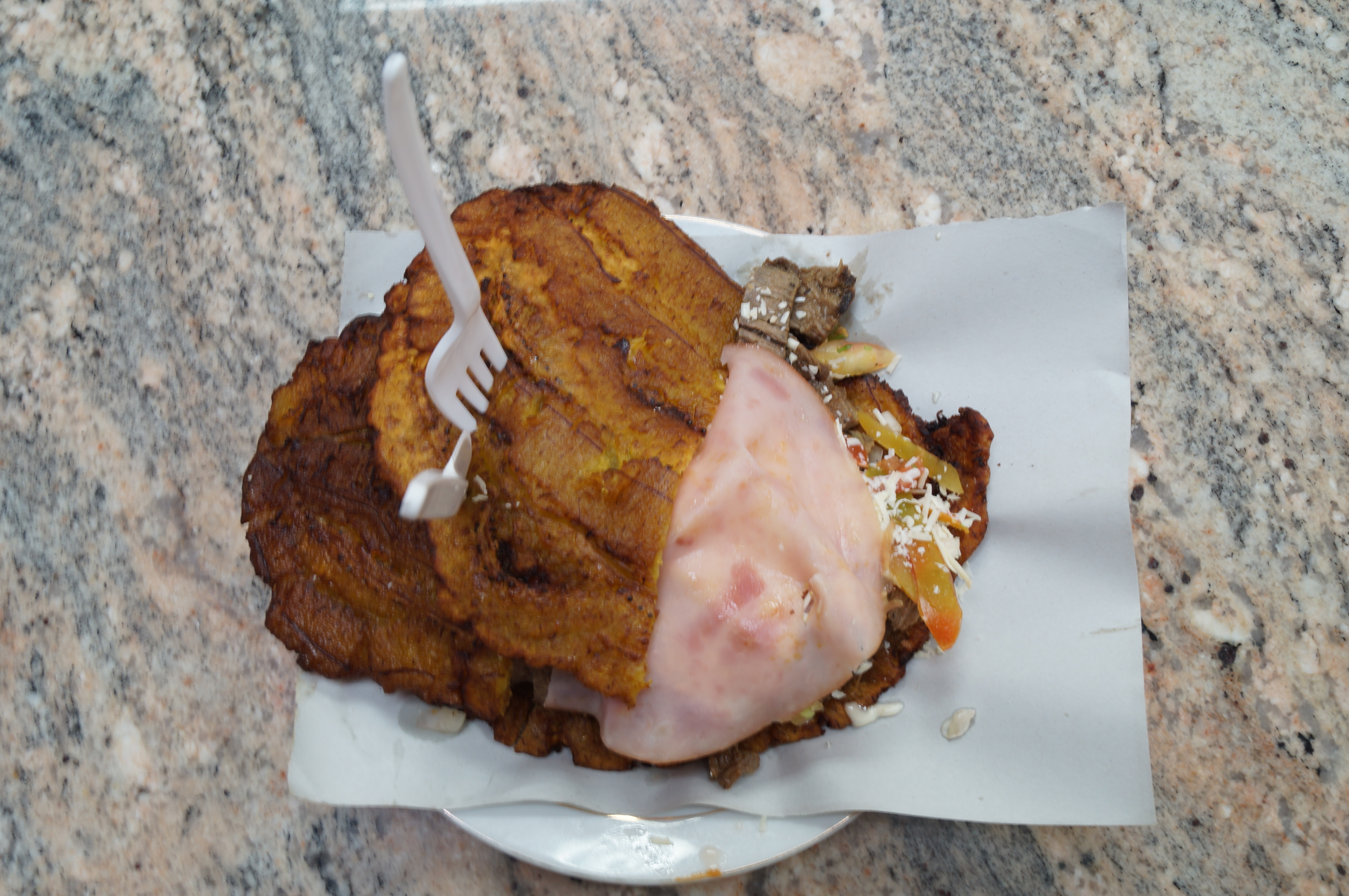 Patacón Maduro. Tambien llamado patacón amarillo, debido a que se hace con plátano amarillo. Comida tradicional. Maracaibo. Edo. Zulia.